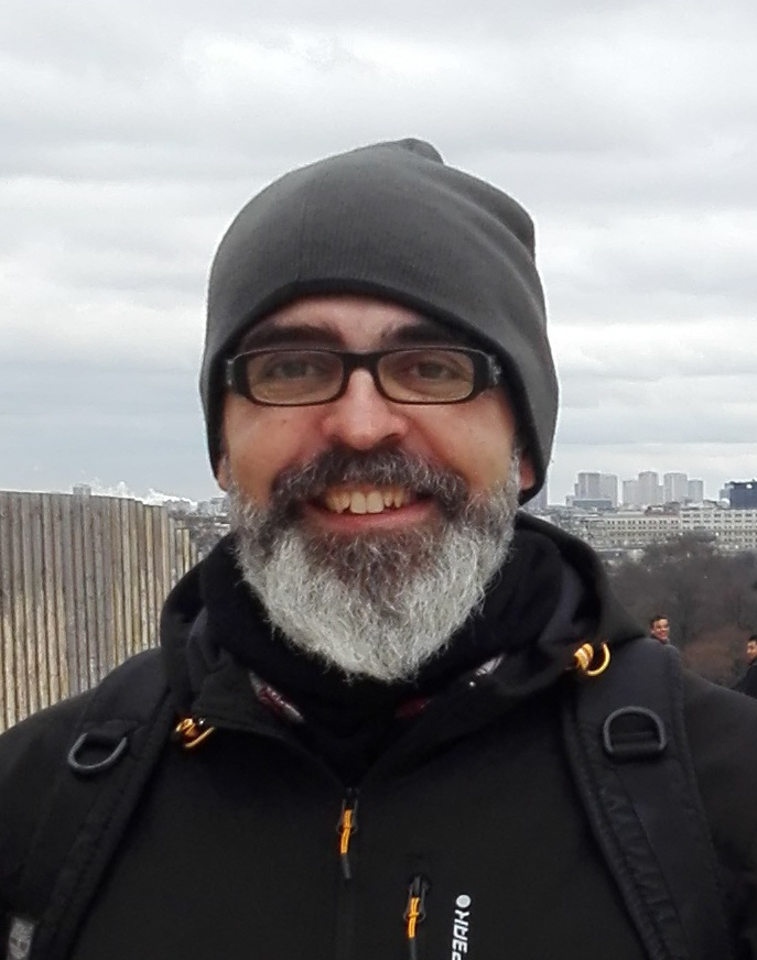 Un rostre que sí és meu